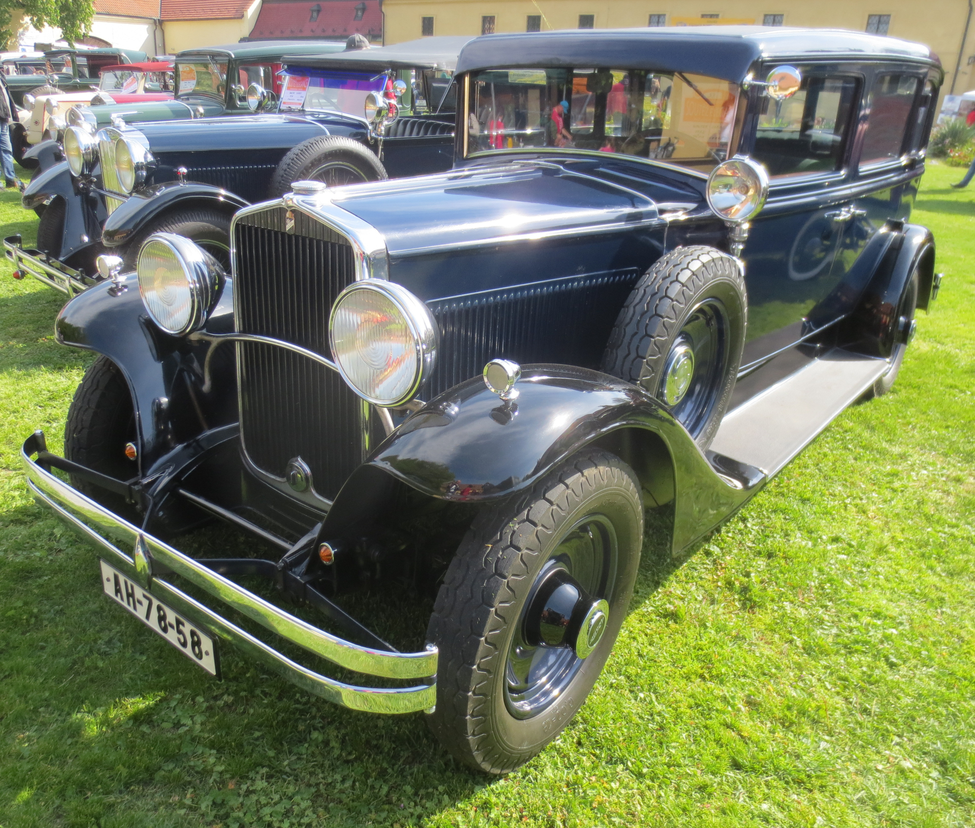 Walter Lord limuzína (1932), Roztoky 2019